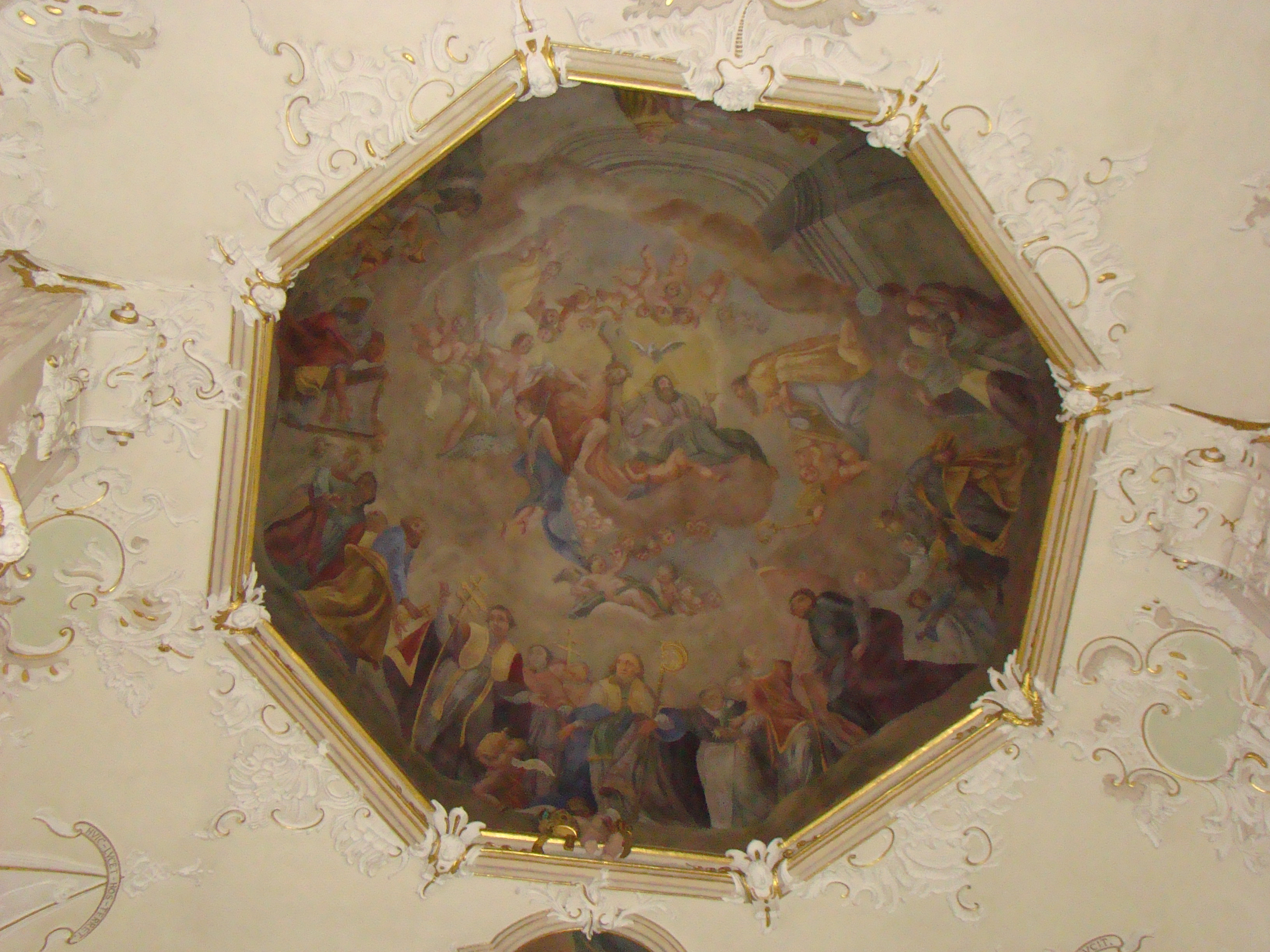 St. Laurentius in Wiesloch, Deckengemälde in Kuppel